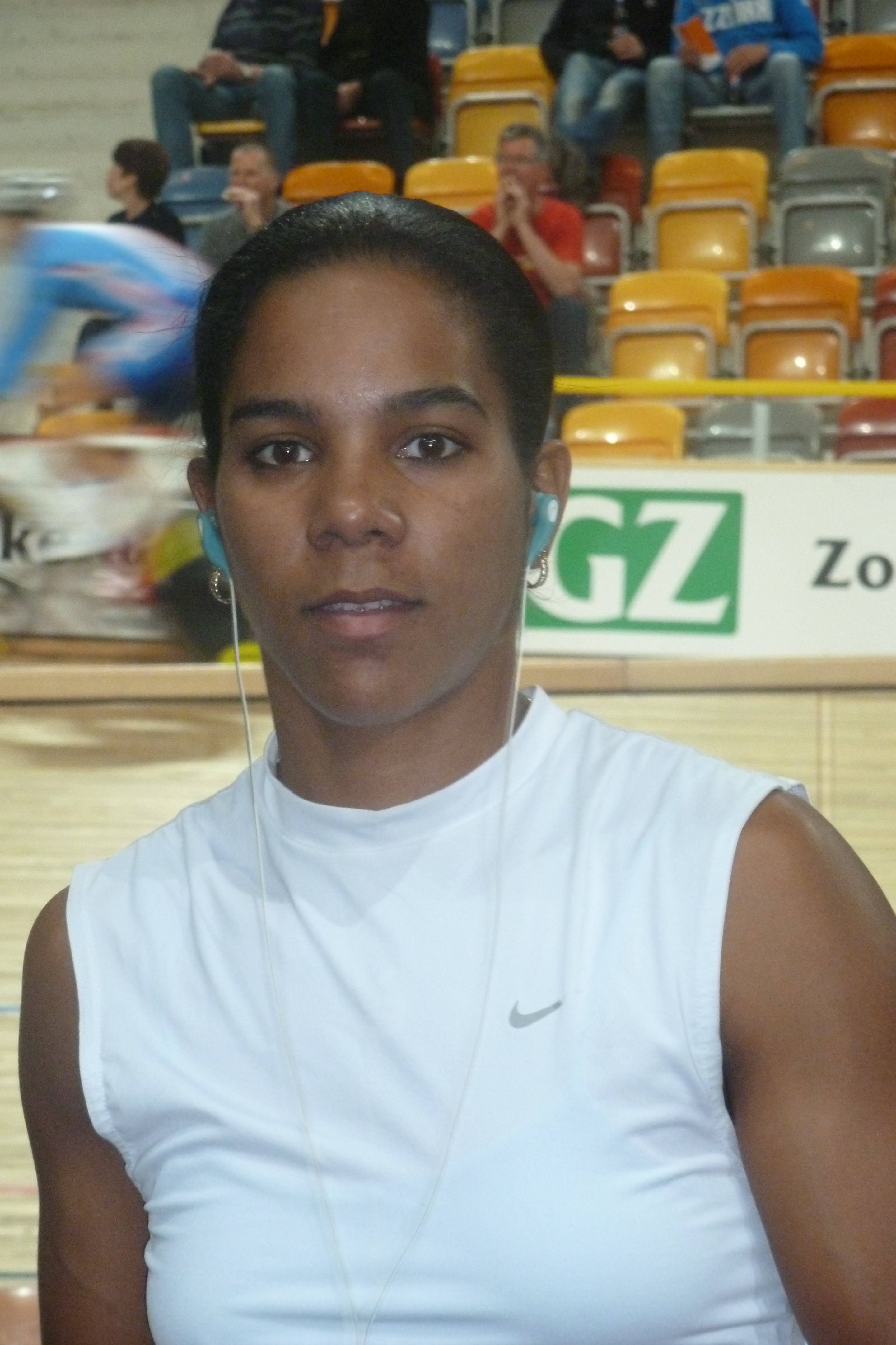 Lisandra Guerra, kubanische Radrennfahrerin